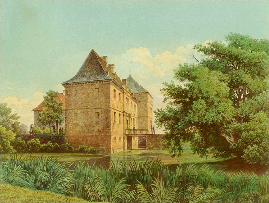 Lithografie des Schlosses Strünkede, Kreis Bochum, Provinz Westphalen